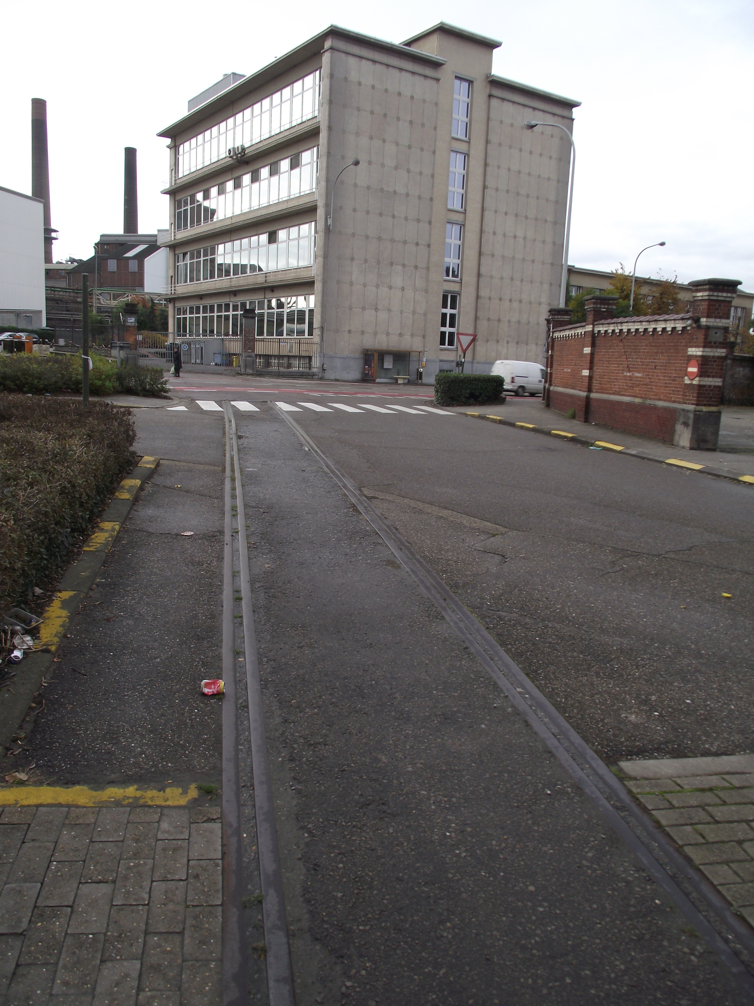 Vroeger normaalspoor van aansluiting naar de suikerfabriek. Deze particuliere spoorlijn kwam van het station Grimde, waar de suikerfabriek een eigen rangeerterrein had. Rechts van dit spoor was er een metersporige buurtspoorlijn die een eigen aansluiting had naar de fabriek.